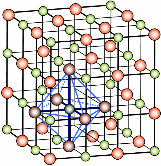 Crystal lattice of the common salt (NaCl) Description in de wikipedia Bildbeschreibung: NaCl- Ionengitter Quelle: selbst erstellt von H. Hoffmeister Fotograf/Zeichner: H. Hoffmeister Datum: 14.10.2005